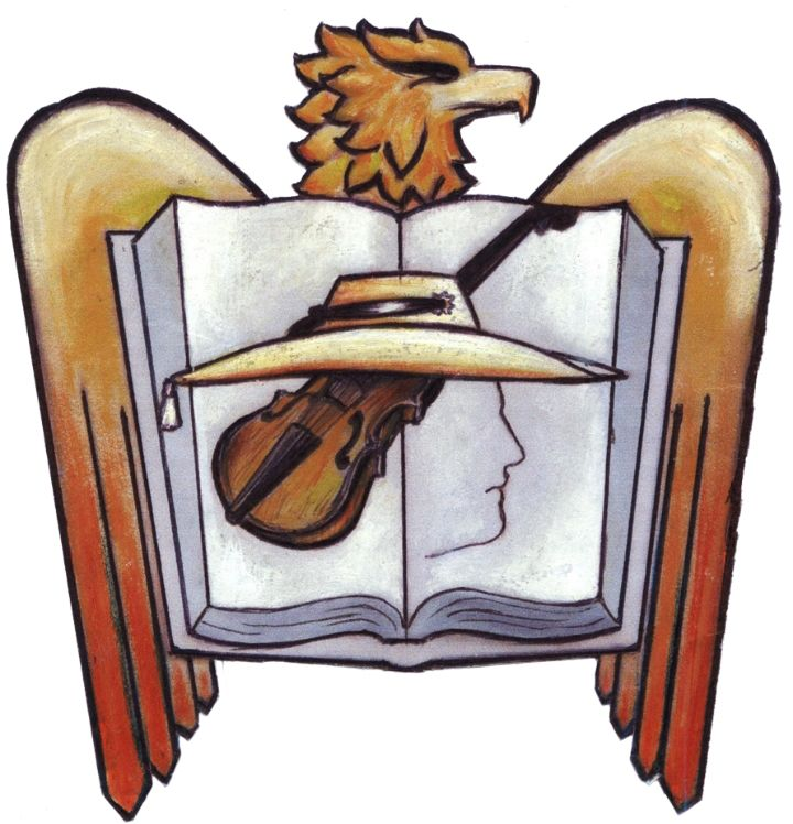 Escudo de General Pico